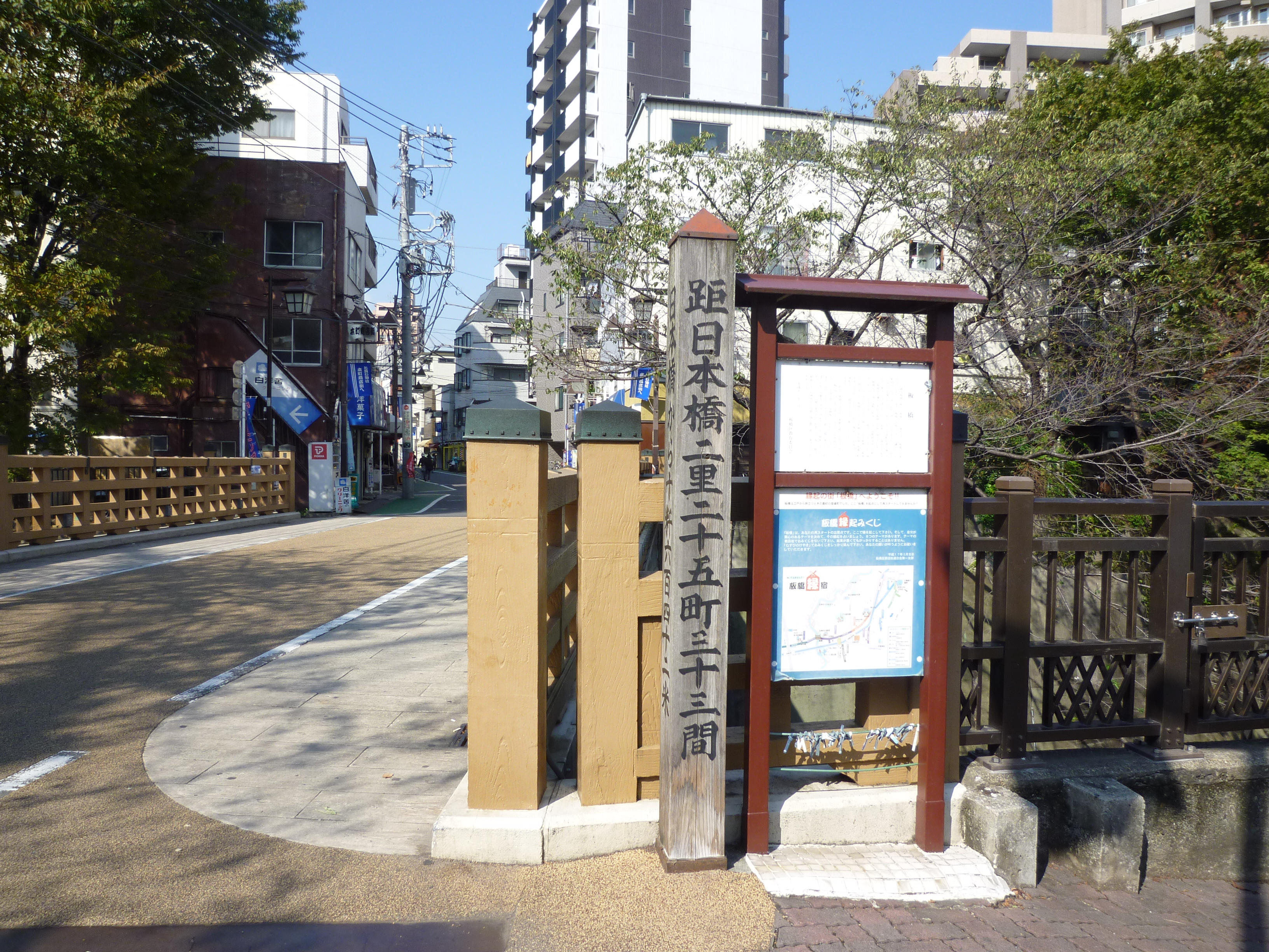 旧中山道に架かる板橋